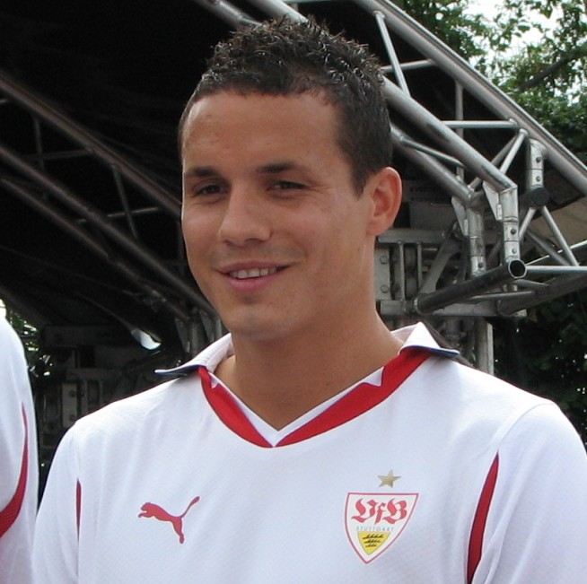 Philipp Degen beim Saison Opening des VfB im Jahr 2010. Aufgenommen von